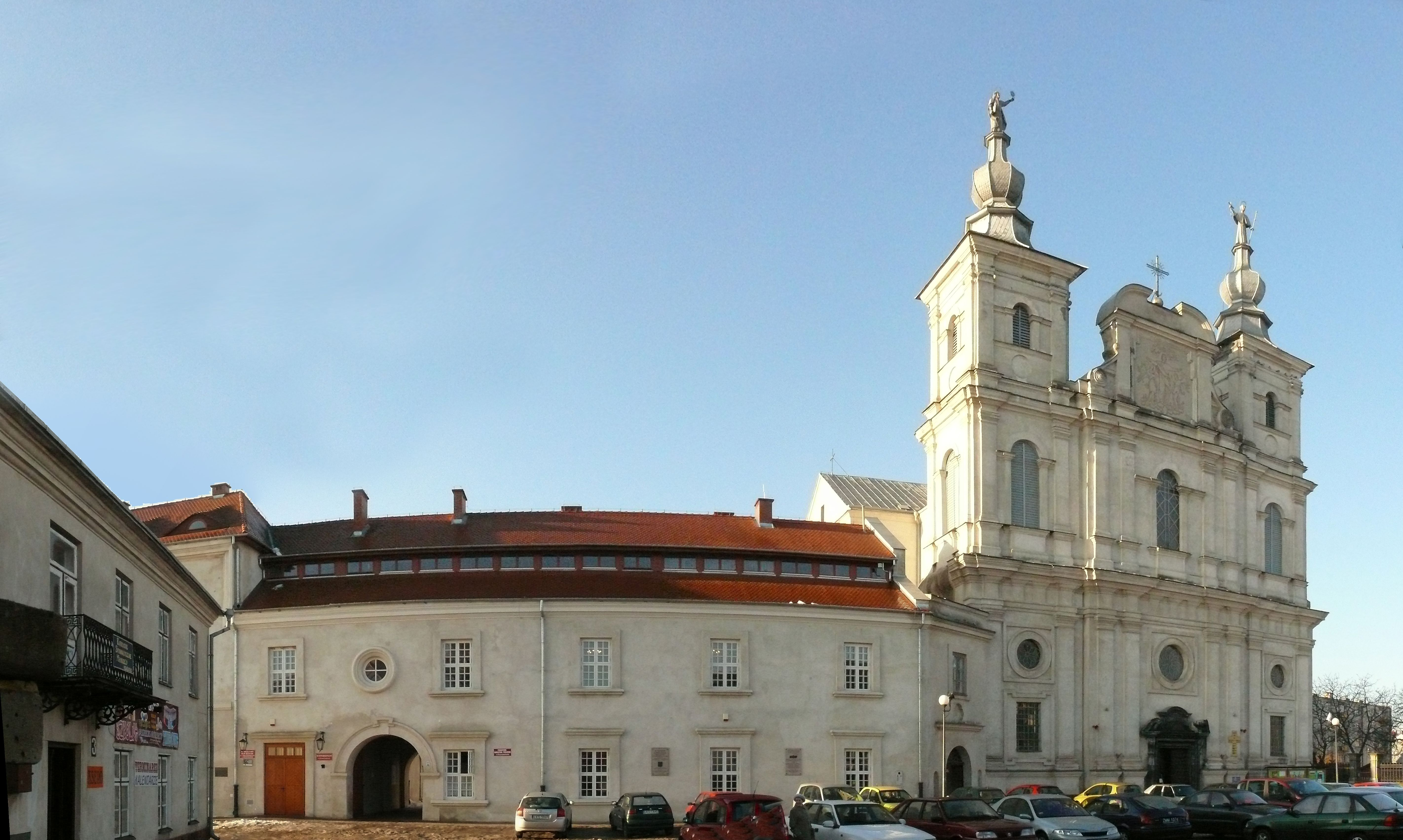 Panorama barokowego kościoła p.w. Św. Franciszka Ksawerego w Krasnymstawie, woj. lubelskie